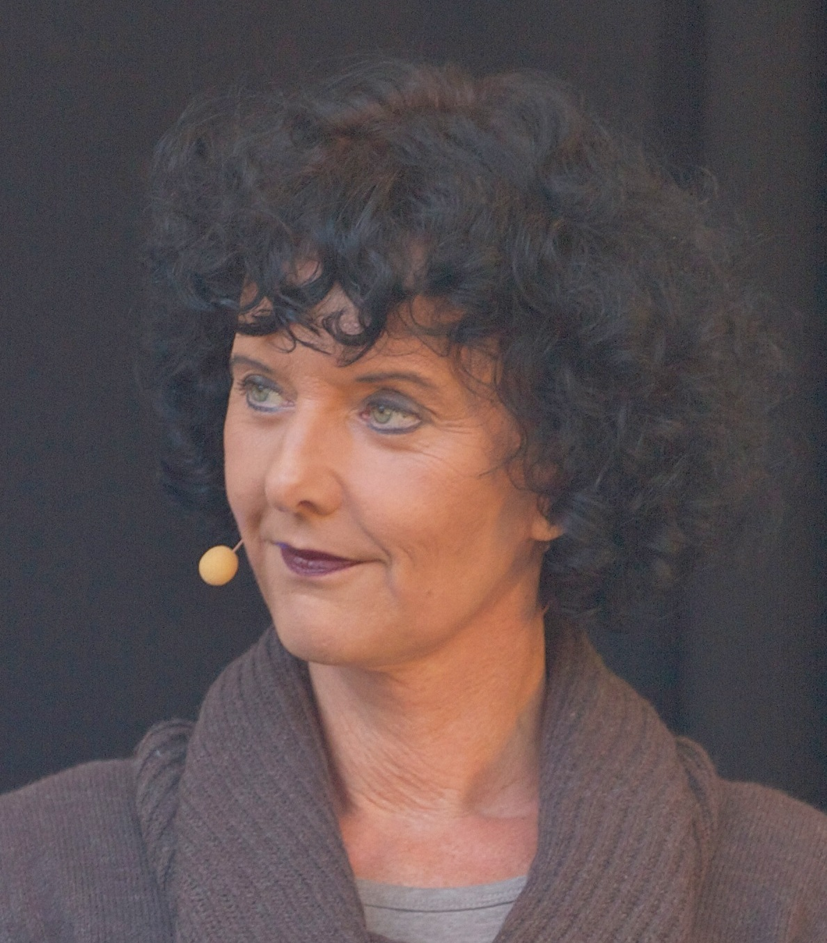 Unni Lindell på Oslo bokfestival 2010.